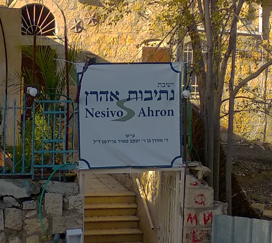 ישיבת נתיבות אהרן בשכונת מוסררה, ירושלים